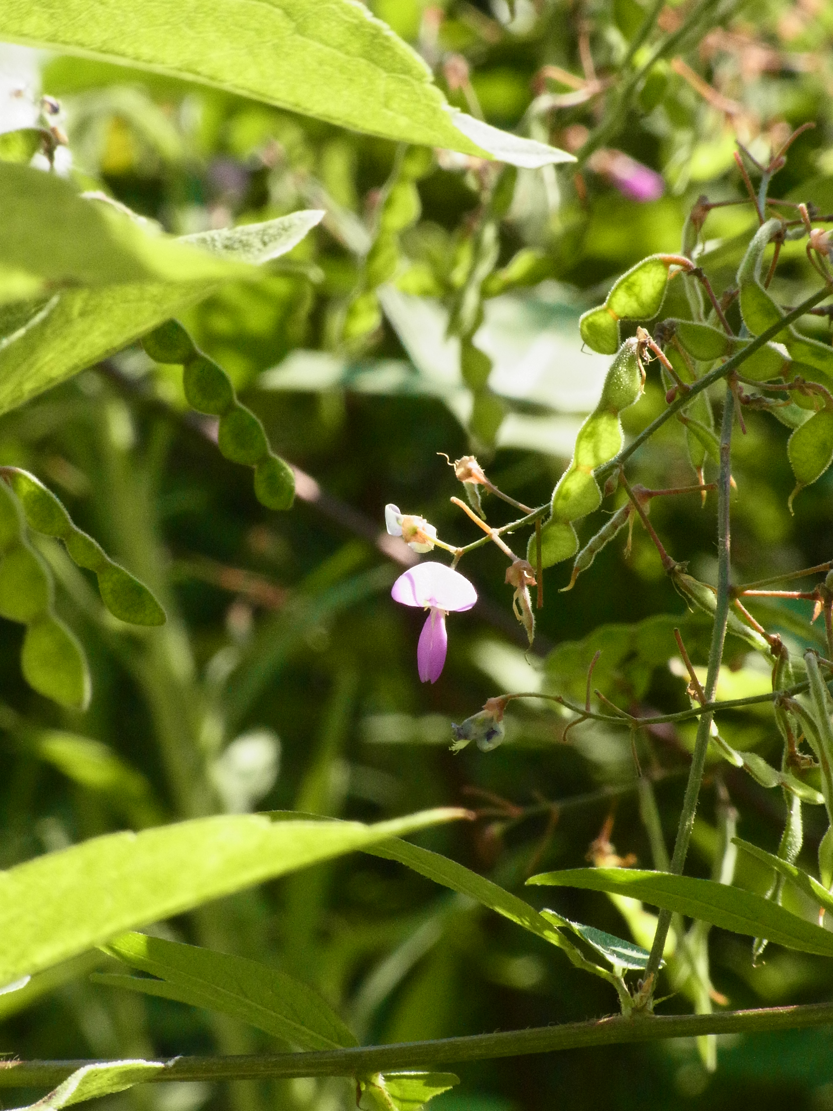 アレチヌスビトハギ